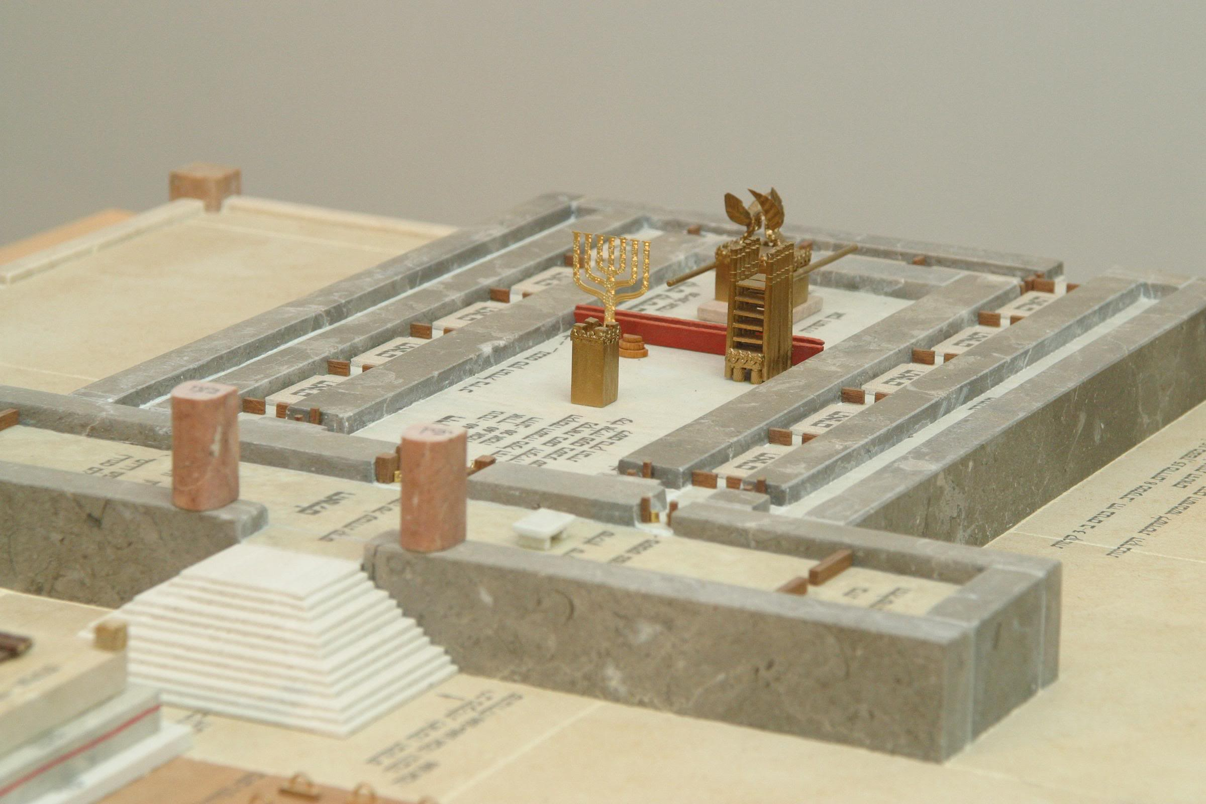 דגם משכן העדות שנוצר על ידי מיכאל אוסניס מקדומים